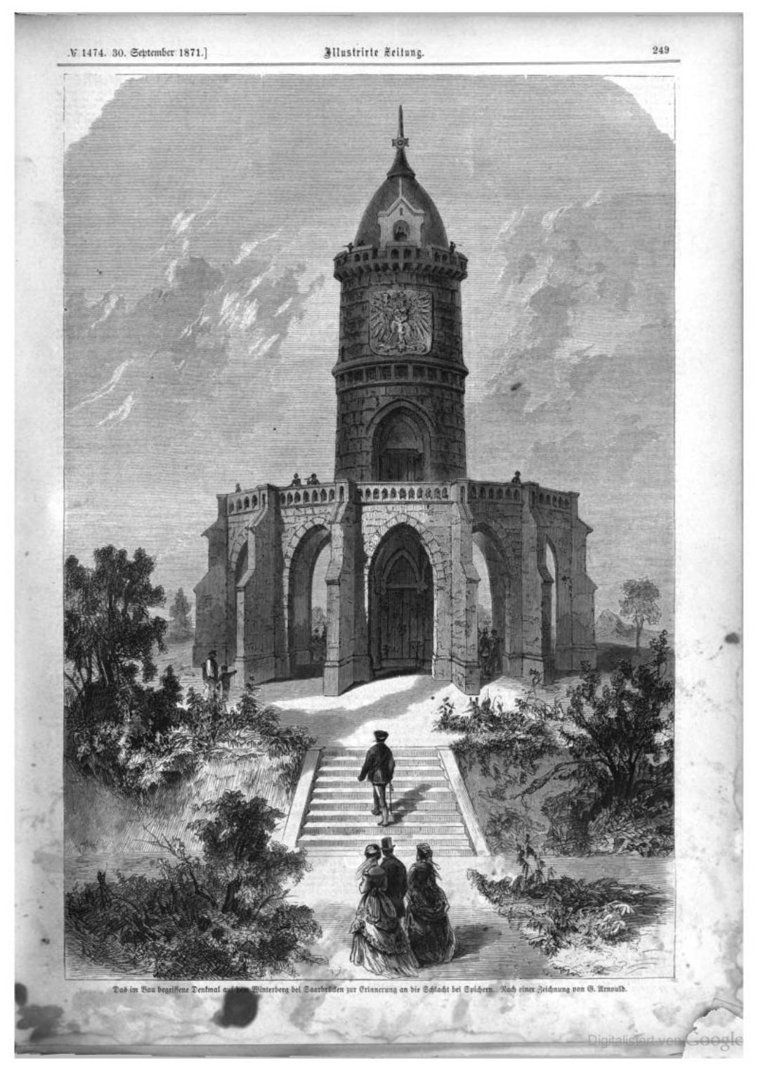 Denkmal zur Schlacht von Spichern auf dem Winterberg bei Saarbruecken - 1871